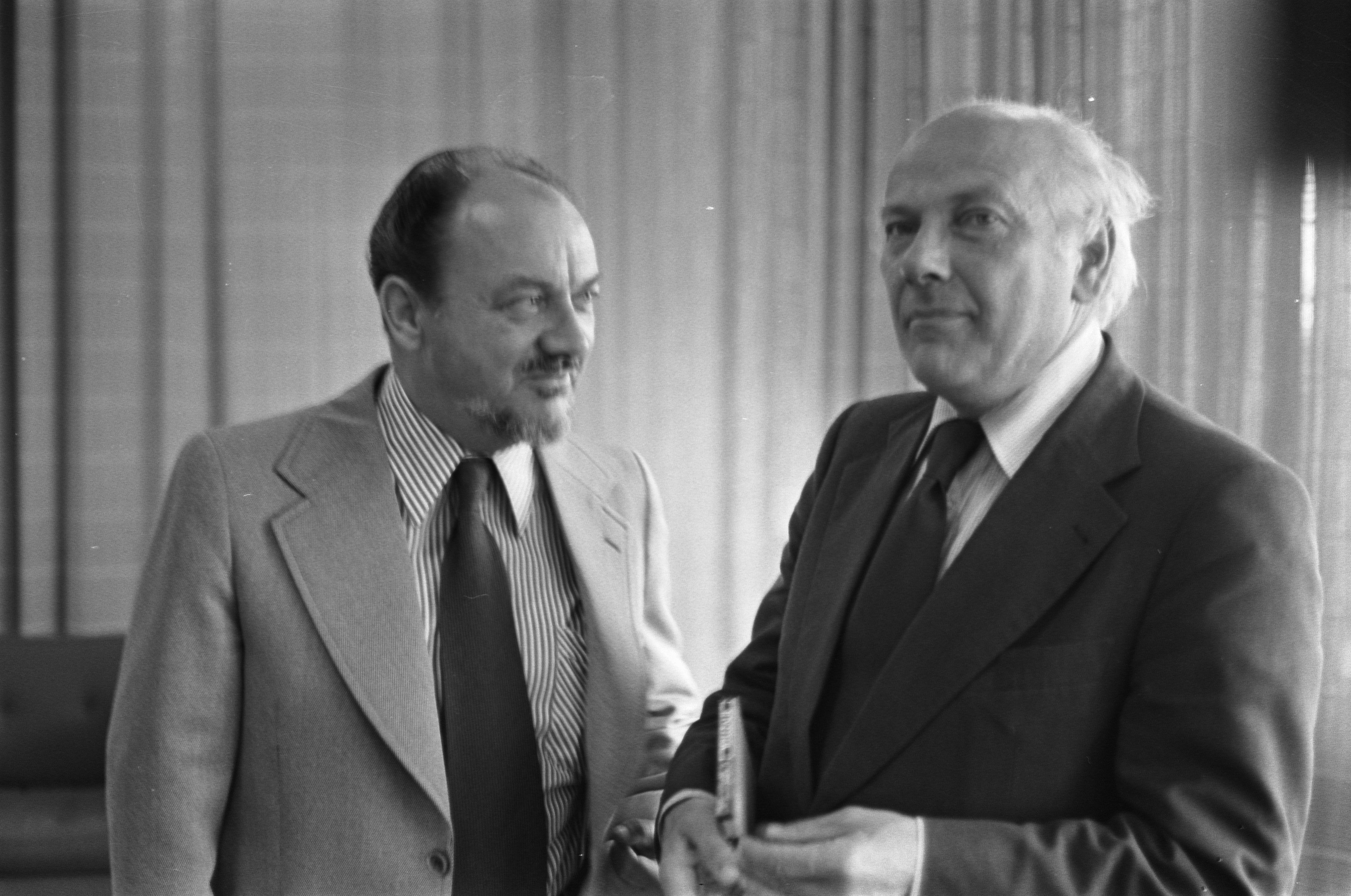 Collectie / Archief : Fotocollectie Anefo Reportage / Serie : Minister-president Anker Jorgensen uit Denemarken op Schiphol Beschrijving : De Deense premier (l) in gesprek met Den Uyl Datum : 19 augustus 1975 Locatie : Noord-Holland, Schiphol Trefwoorden : aankomst en vertrek, minister-presidenten, vliegvelden Persoonsnaam : Jörgensen, Anker, Uyl, Joop den Fotograaf : Rob Mieremet / Anefo Auteursrechthebbende : Nationaal Archief Materiaalsoort : Negatief (zwart/wit) Nummer archiefinventaris : bekijk toegang 2.24.01.05 Bestanddeelnummer : 928-1099